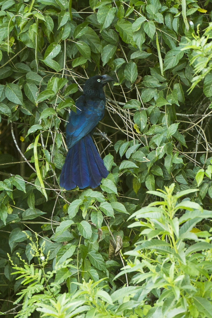 Greater Ani - REGUA - Brazil_S4E1034